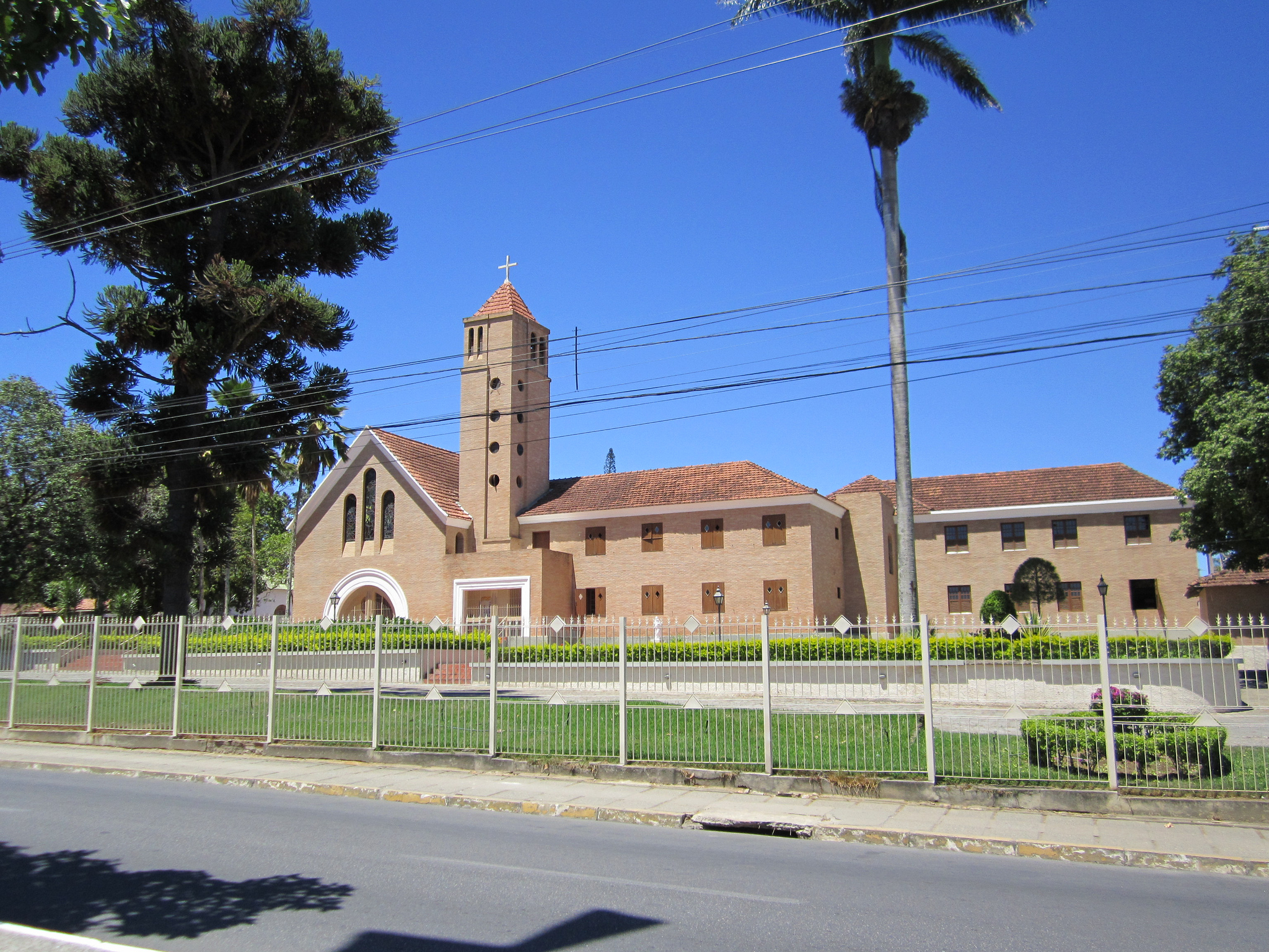 Seminário São José - Garanhuns, Pernambuco, Brasil